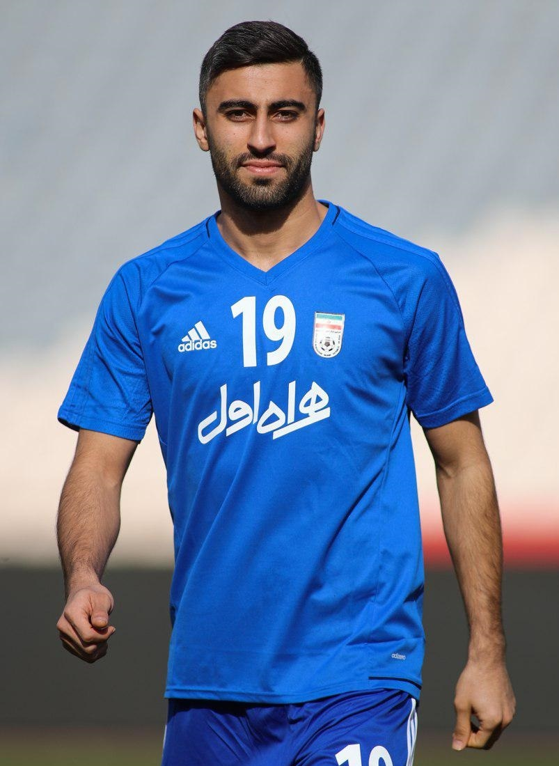 کاوه رضایی در تمرین تیم ملی فوتبال ایران